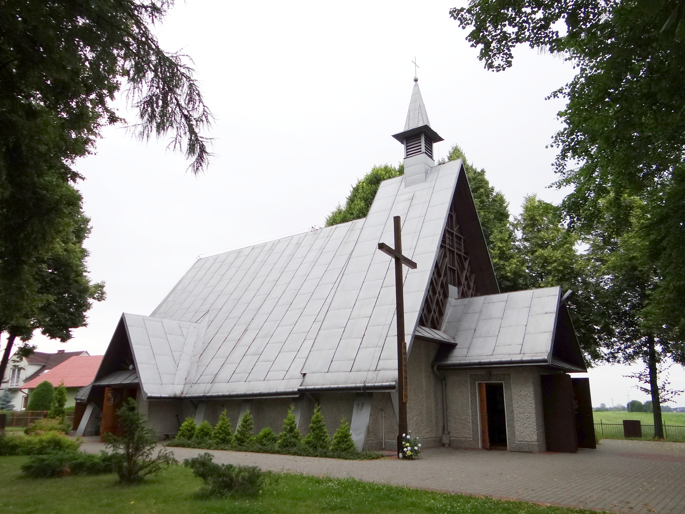 Zdjęcie wykonane w miejscowości Przędzel, powiat niżański.